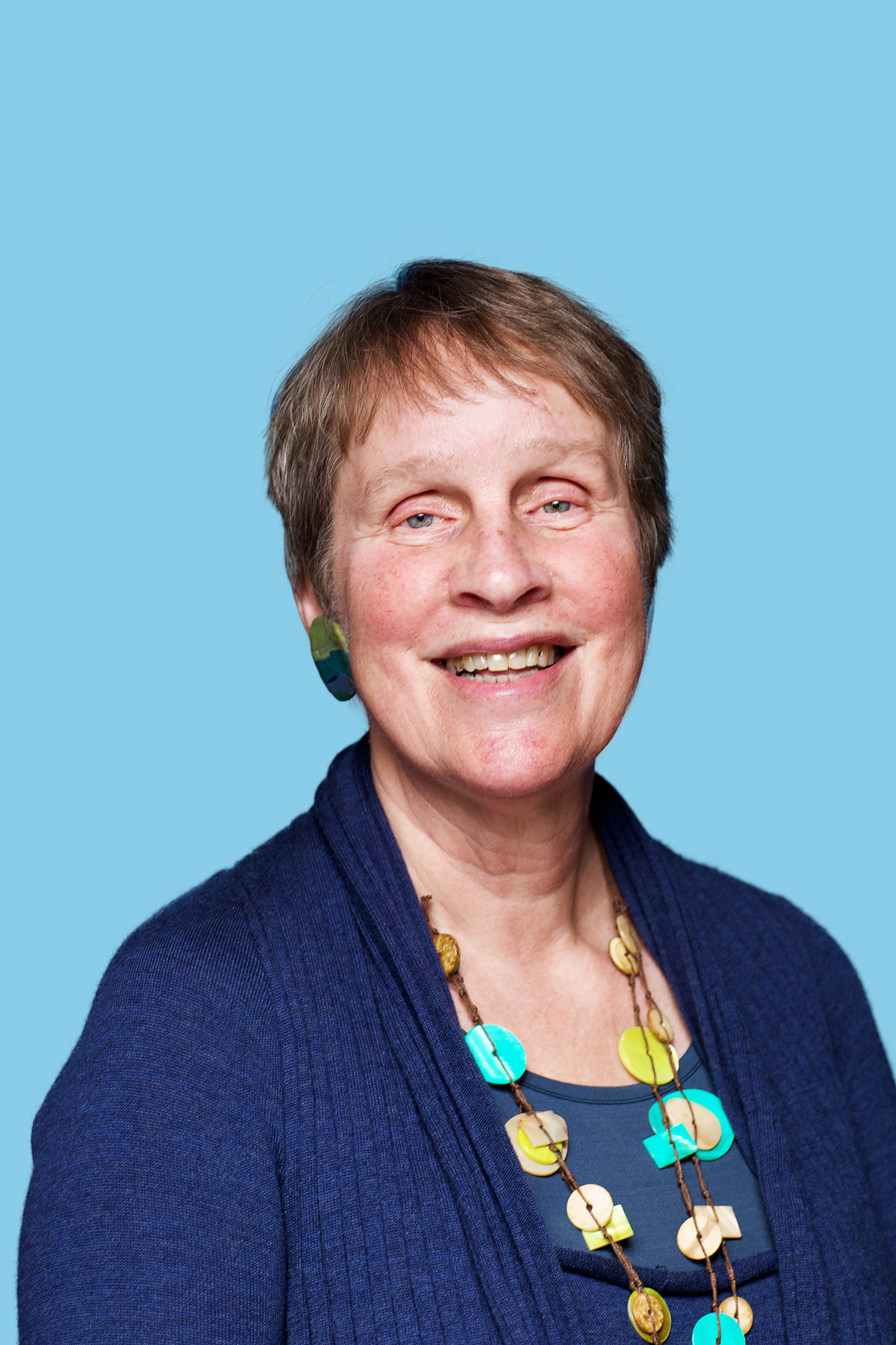 18 januari 2015. Kandidaat voor de Eerste Kamer. Op pvda.nl de volledige kandidatenlijst: bit.ly/1zpNRIG. Foto Lex Draijer.